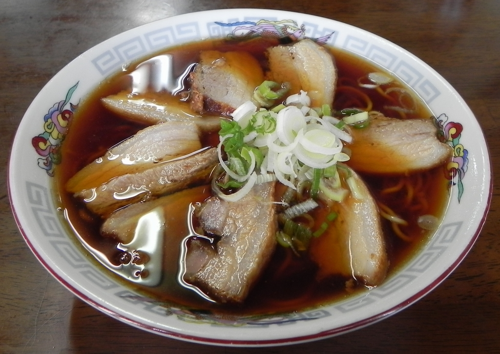 2010年撮影